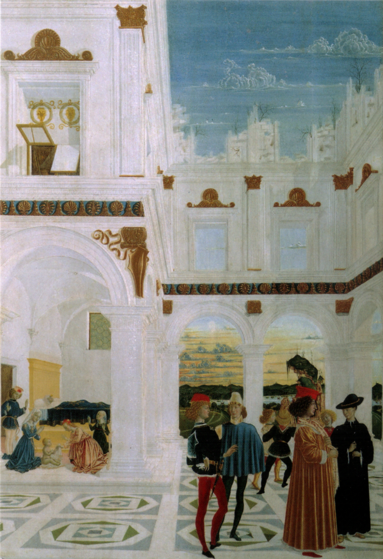 Pietro Perugino and the "Bottega of 1473": Nicchia di San Bernardino, Stories of Saint Bernardino. Cat. no. 8 in Vittoria Garibaldi: Perugino. Catalogo completo. Octavo, Firenze 2000, ISBN 88-8030-091-1